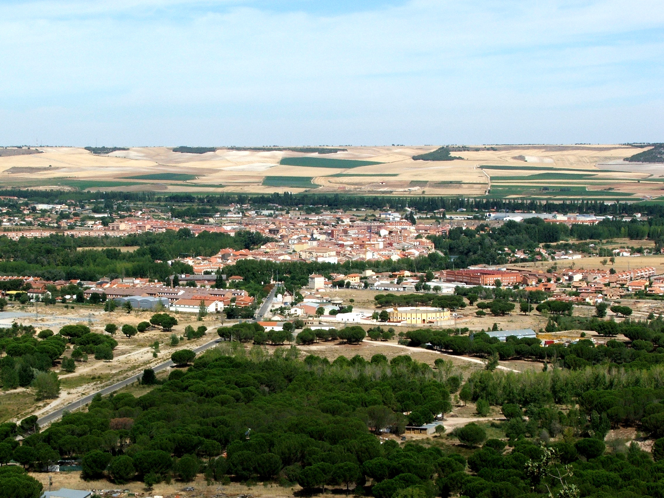 Imagen de Tudela de Duero tomada desde una colina